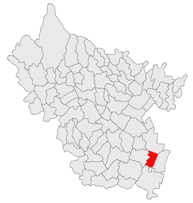 Categorie:Hărţi ale judeţului Buzău